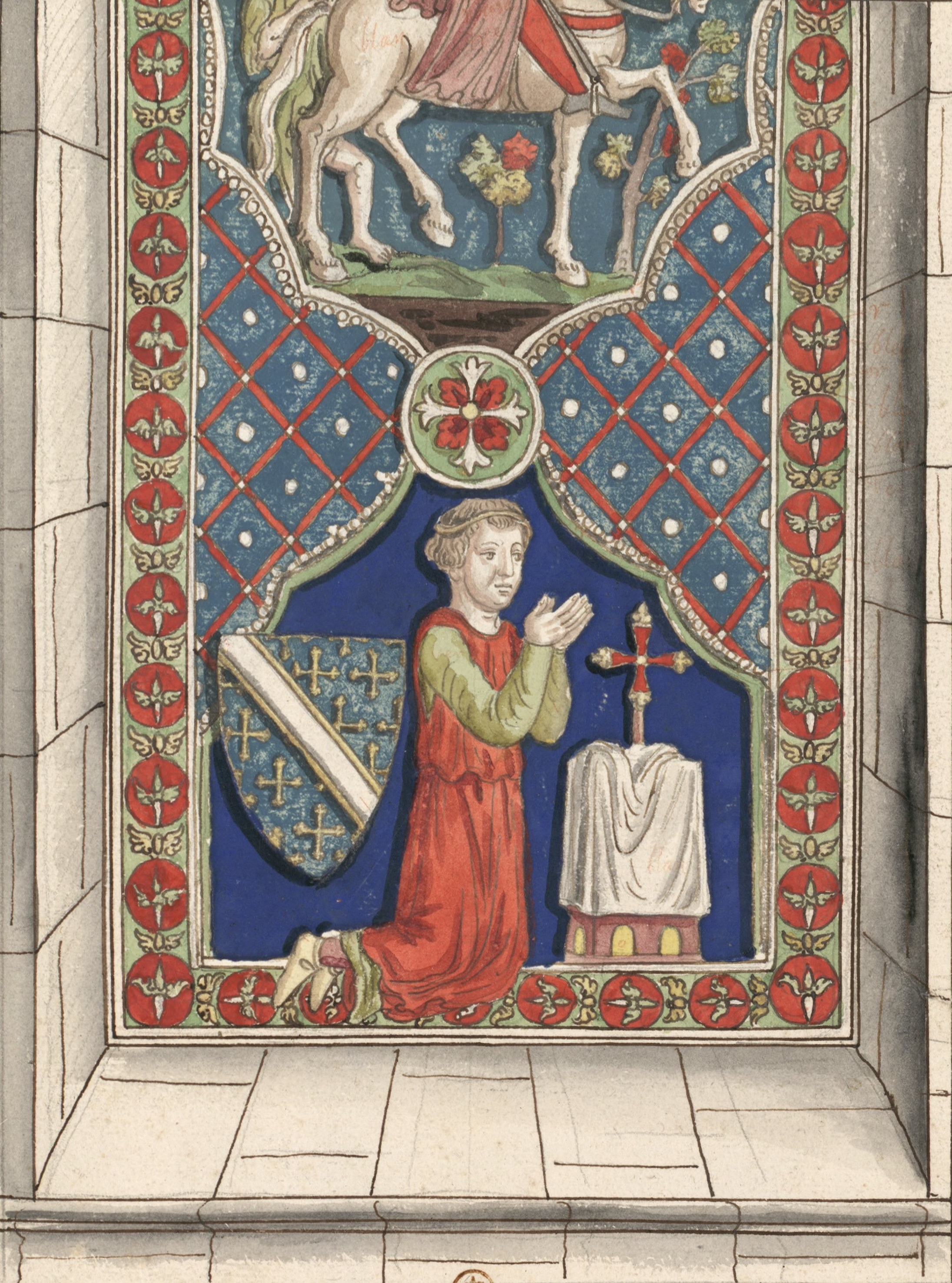 Louis Ier de Sancerre, représenté sur un Vitrail de N.-D. de Chartres